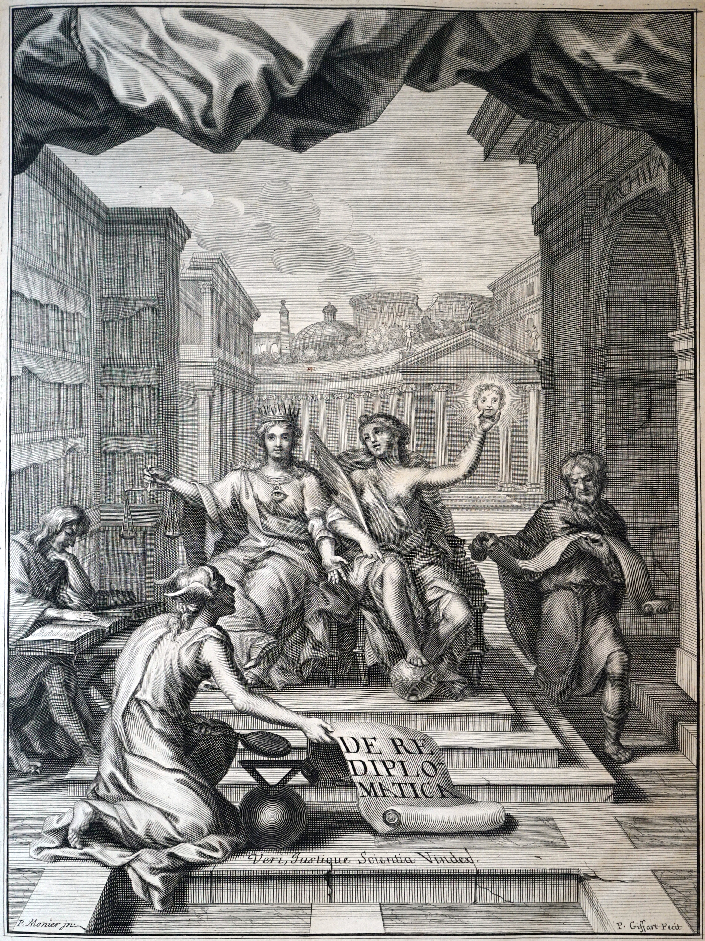 du "De re diplomatica..." de Mabillon. P. Monier et P. Giffart pour la gravure.